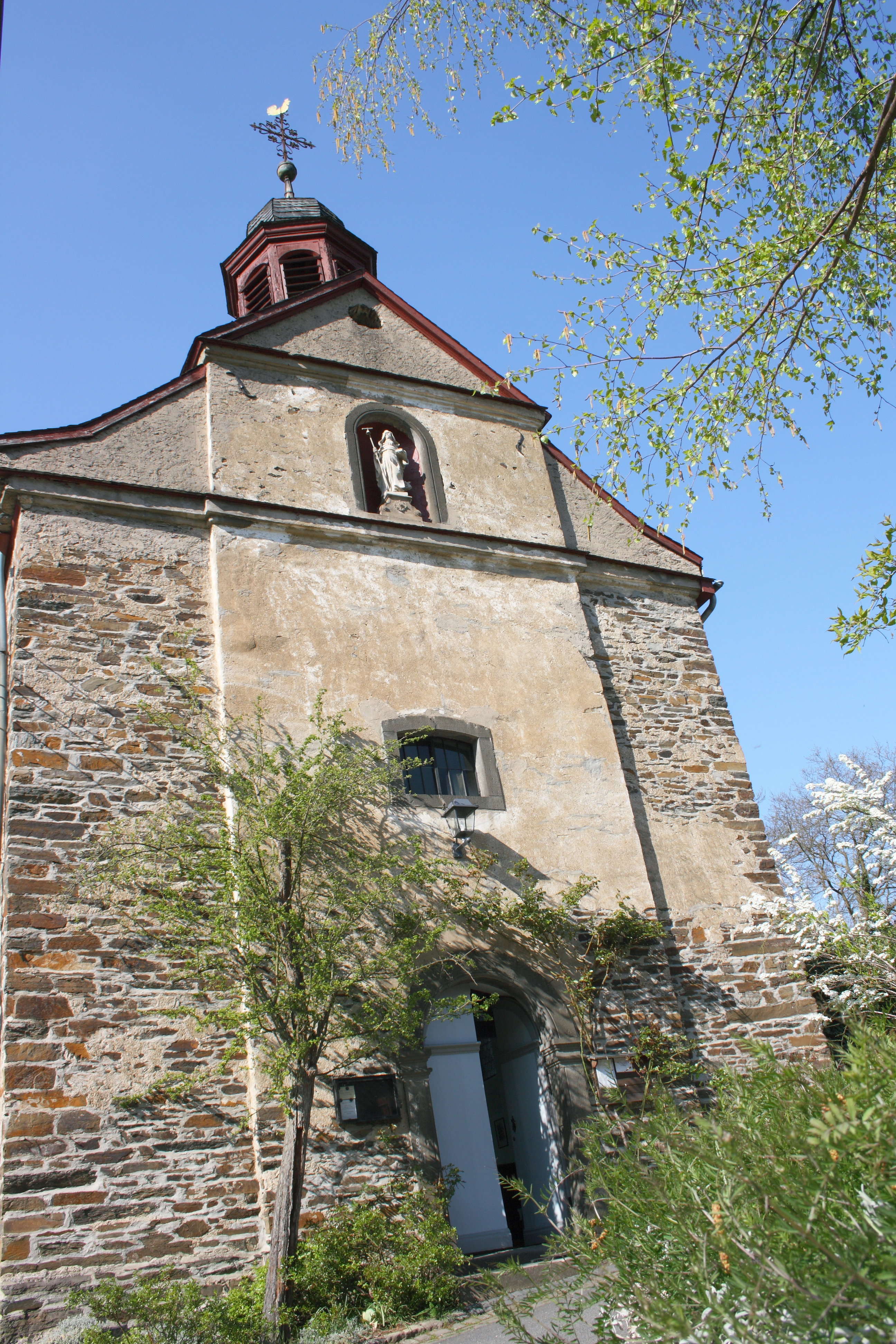 katholische Kapelle St. Antonius Eremit in Kreuzberg